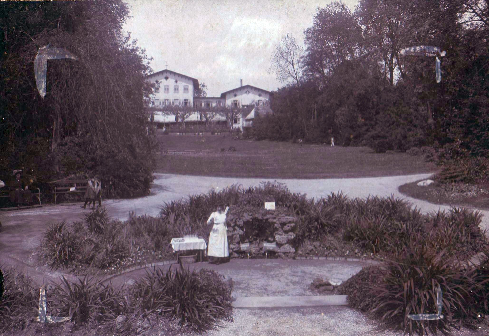 Der alte Kurpark in Bad Soden am Taunus mit Kurhaus und dem Schwefel- und Wilhelmsbrunnen im Jahr 1910